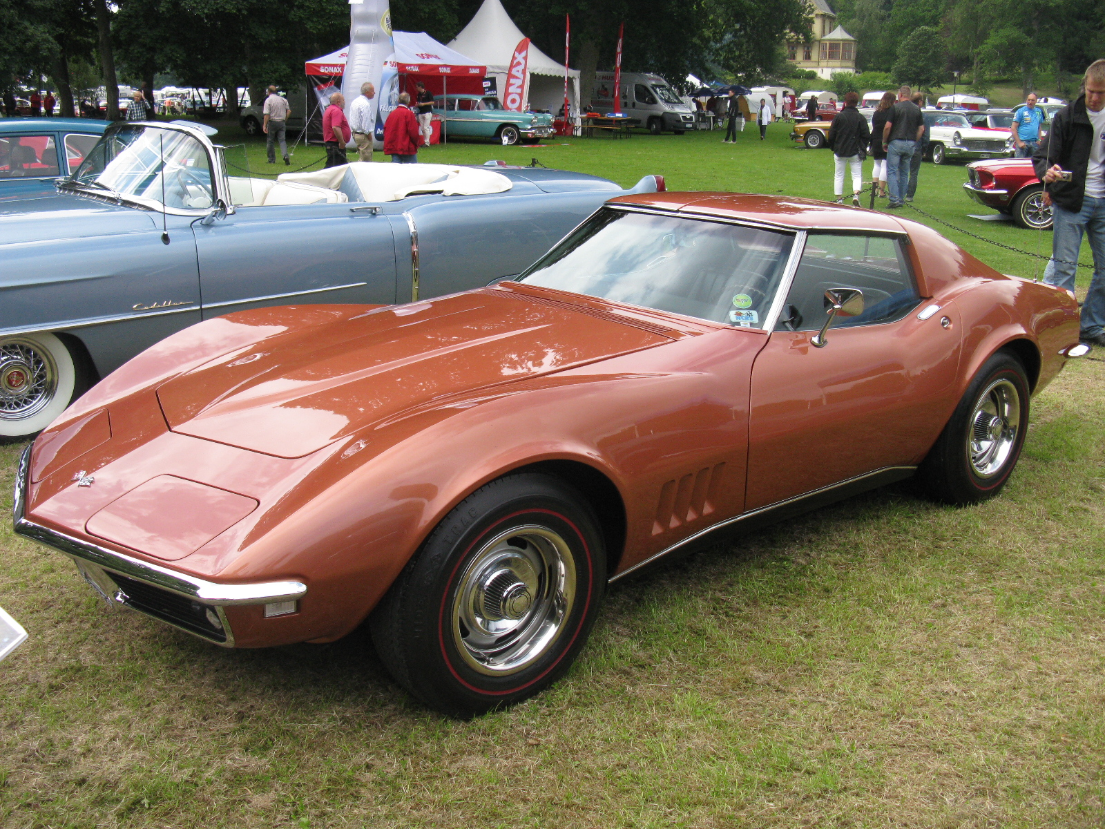 Chevrolet Corvette 1968